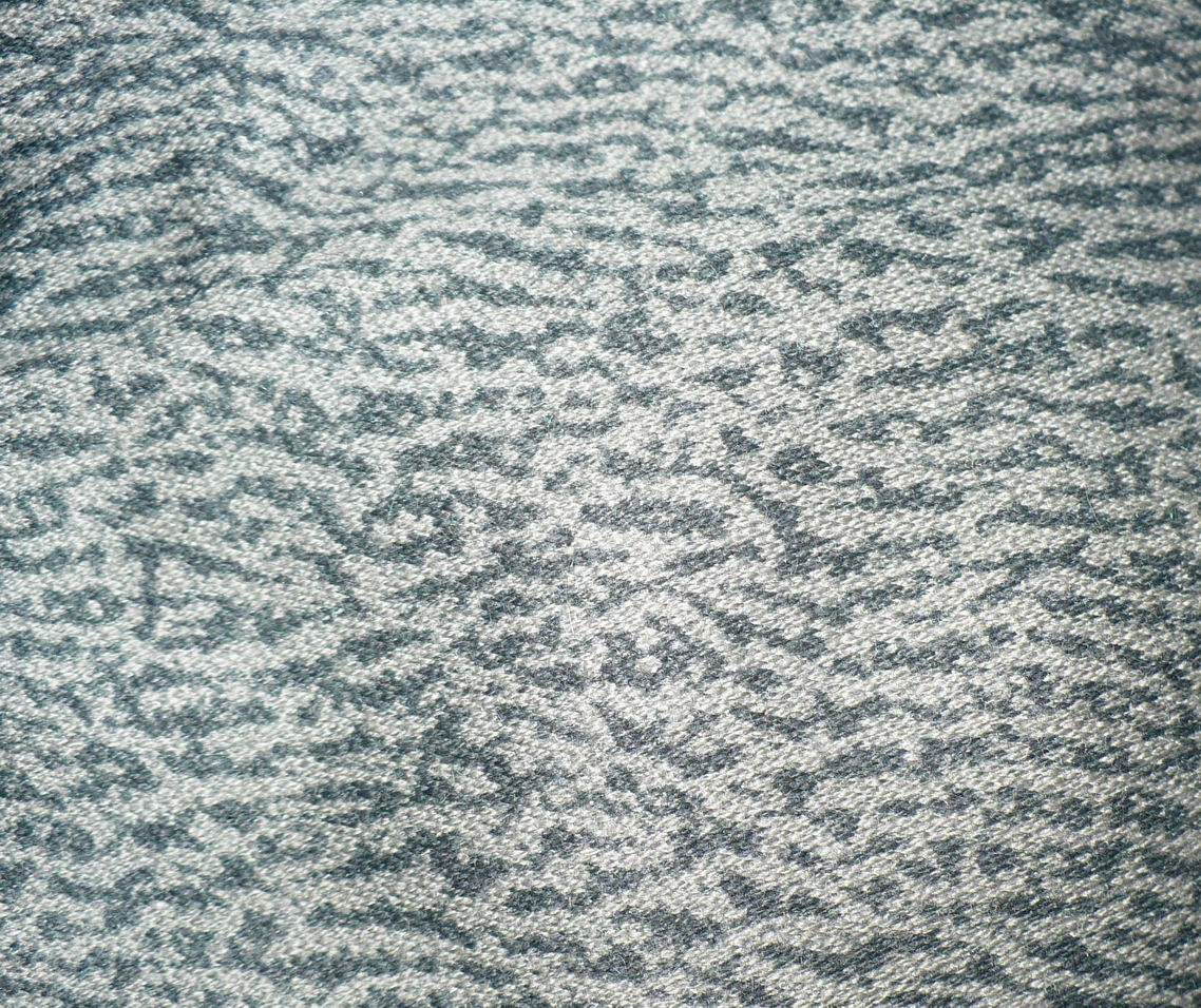 Tkanina z nadrukiem mora Wojsk Lądowych - zielonym